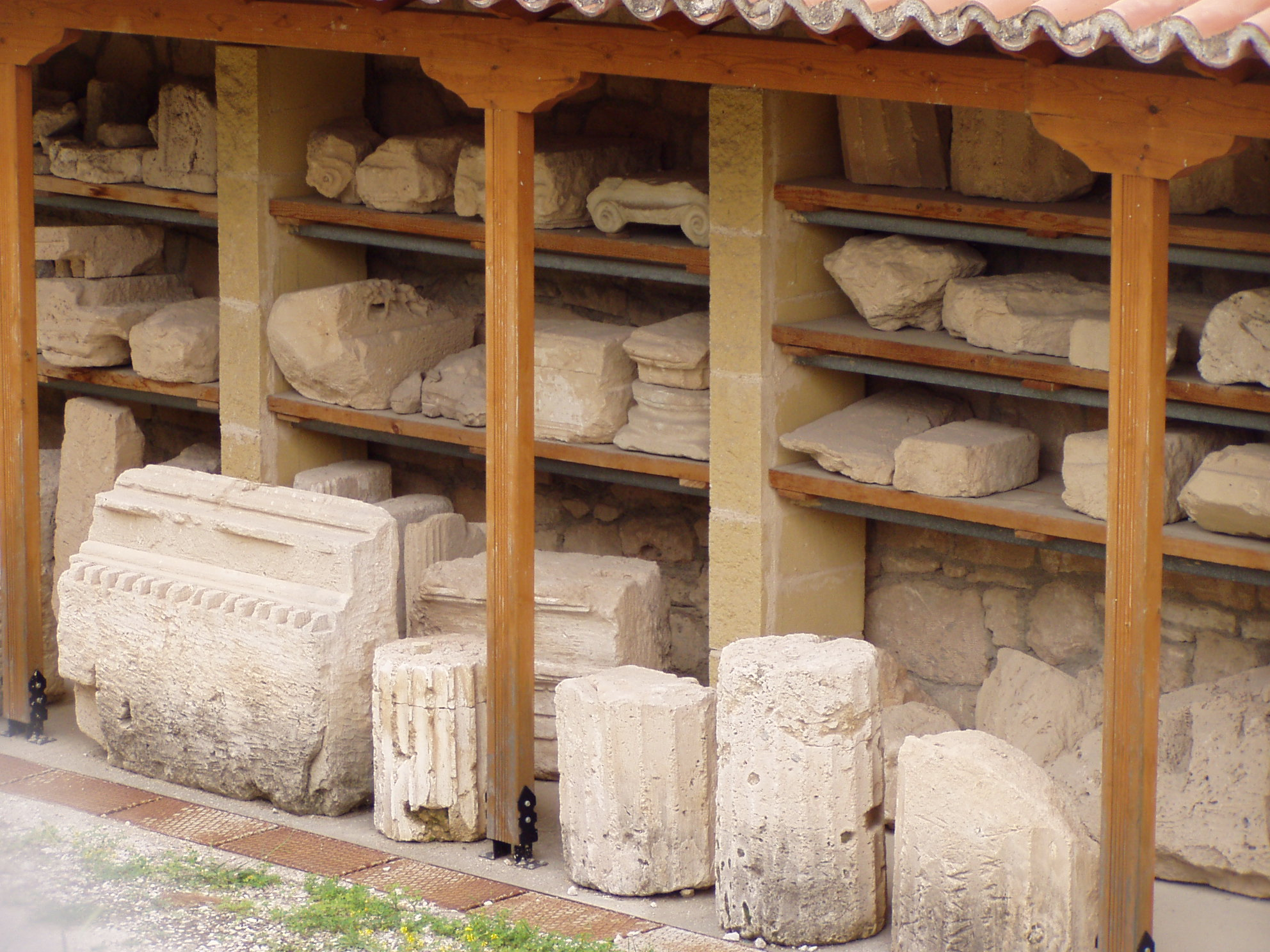 Grabungsmuseum am Apollontempel, Ausschnitt